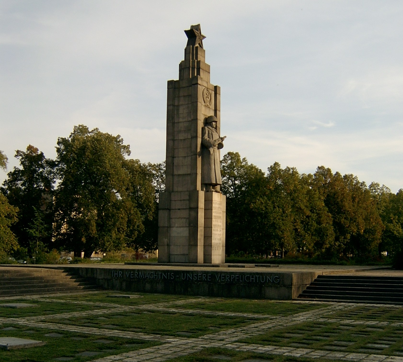 Mahnmal für gefallene sowjetische Soldaten des Zweiten Weltkriegs. Das Manhnmal findet sich im Park südlich der Gertraudenkirche. Der Soldat blickt Richtung Westen